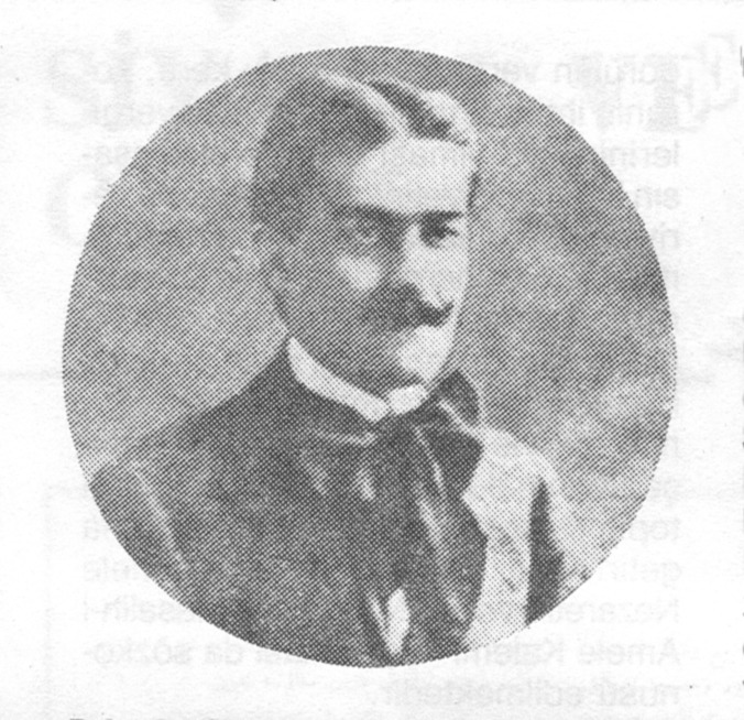 Baha Tevfik, Osmanlı anarşisti.